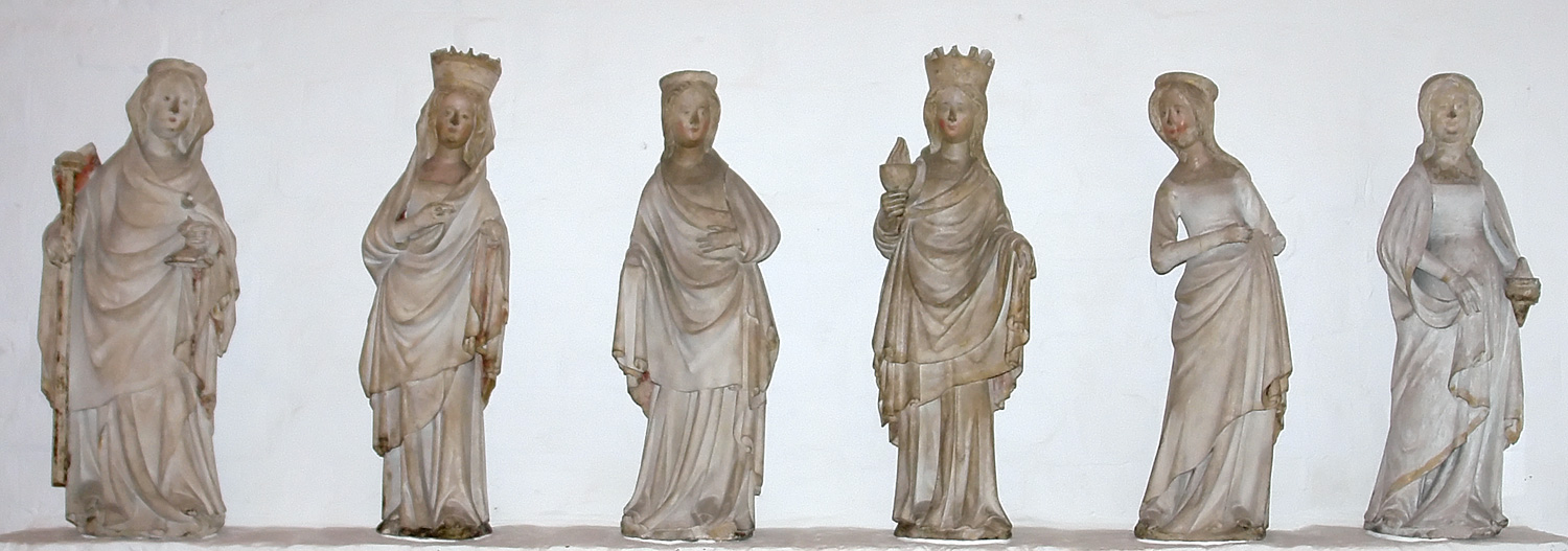 St.-Annen-Kloster Lübeck: Die Klugen Jungfrauen, angeführt durch die Personifikation der Ecclesia. Aus der Burgkirche in Lübeck, Sandstein, Flandern um 1400